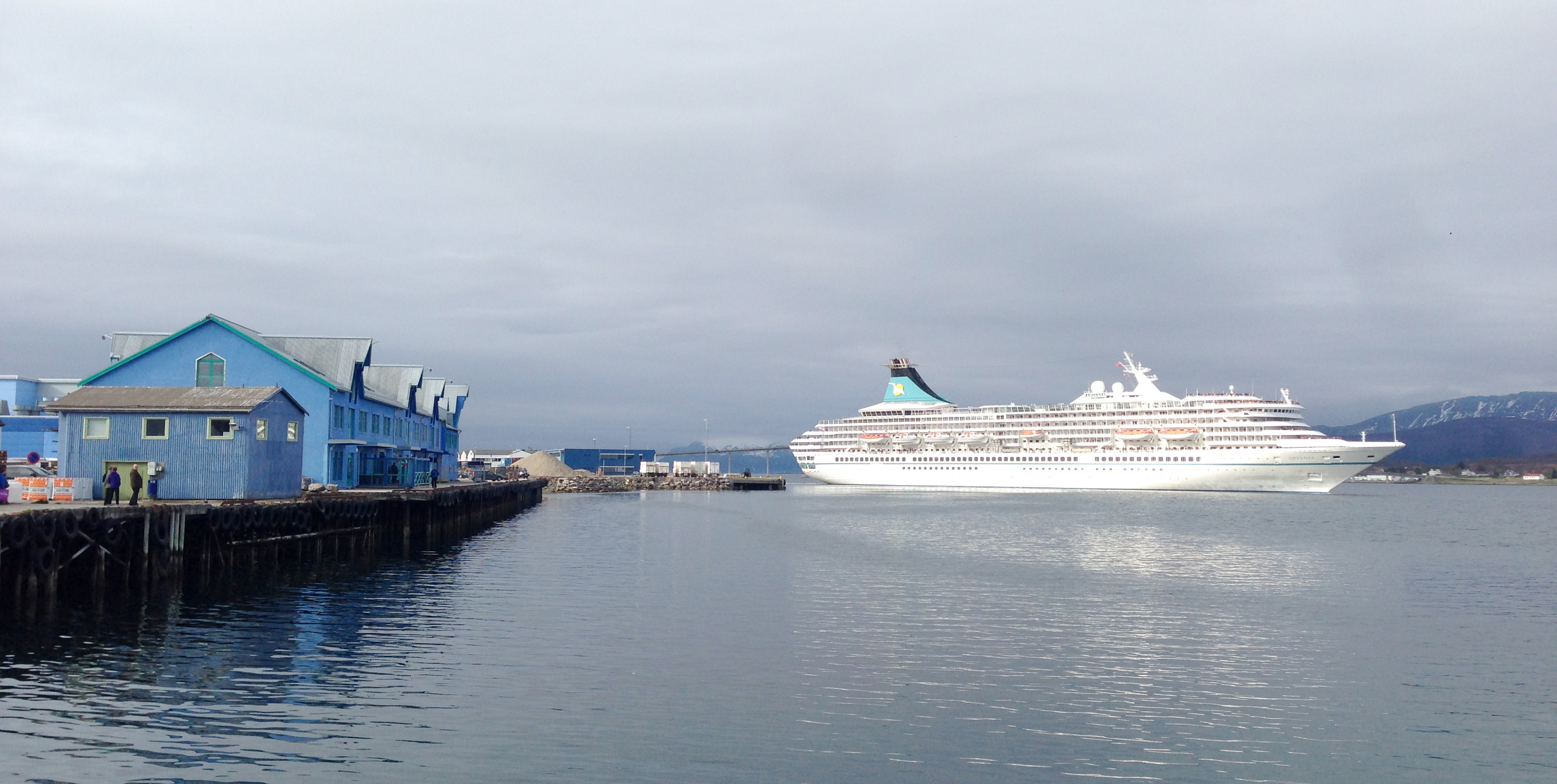 Cruiseskipet Artania besøker Sortland, 23. mai 2014.